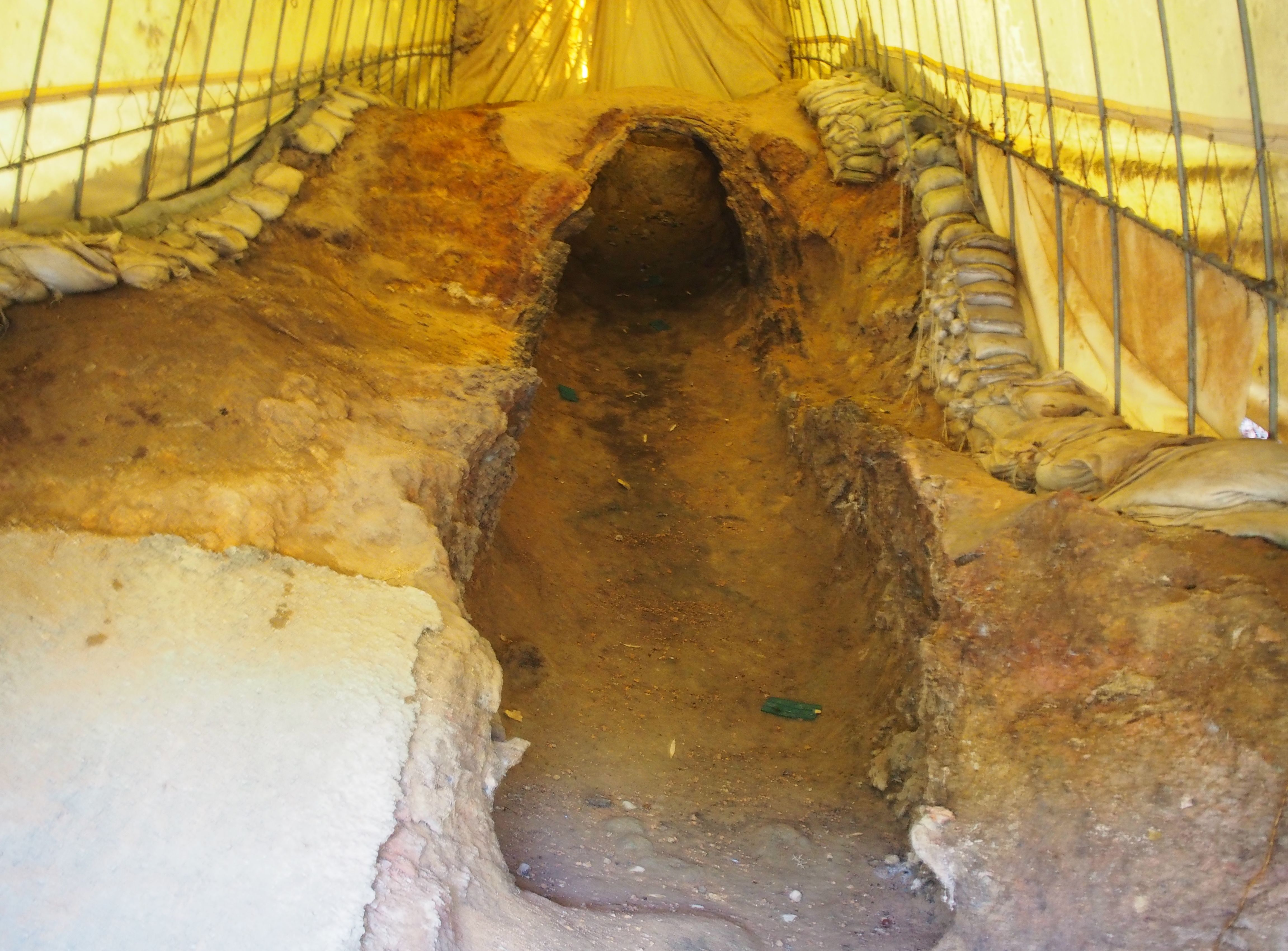 第３号窯(2019年12月撮影)